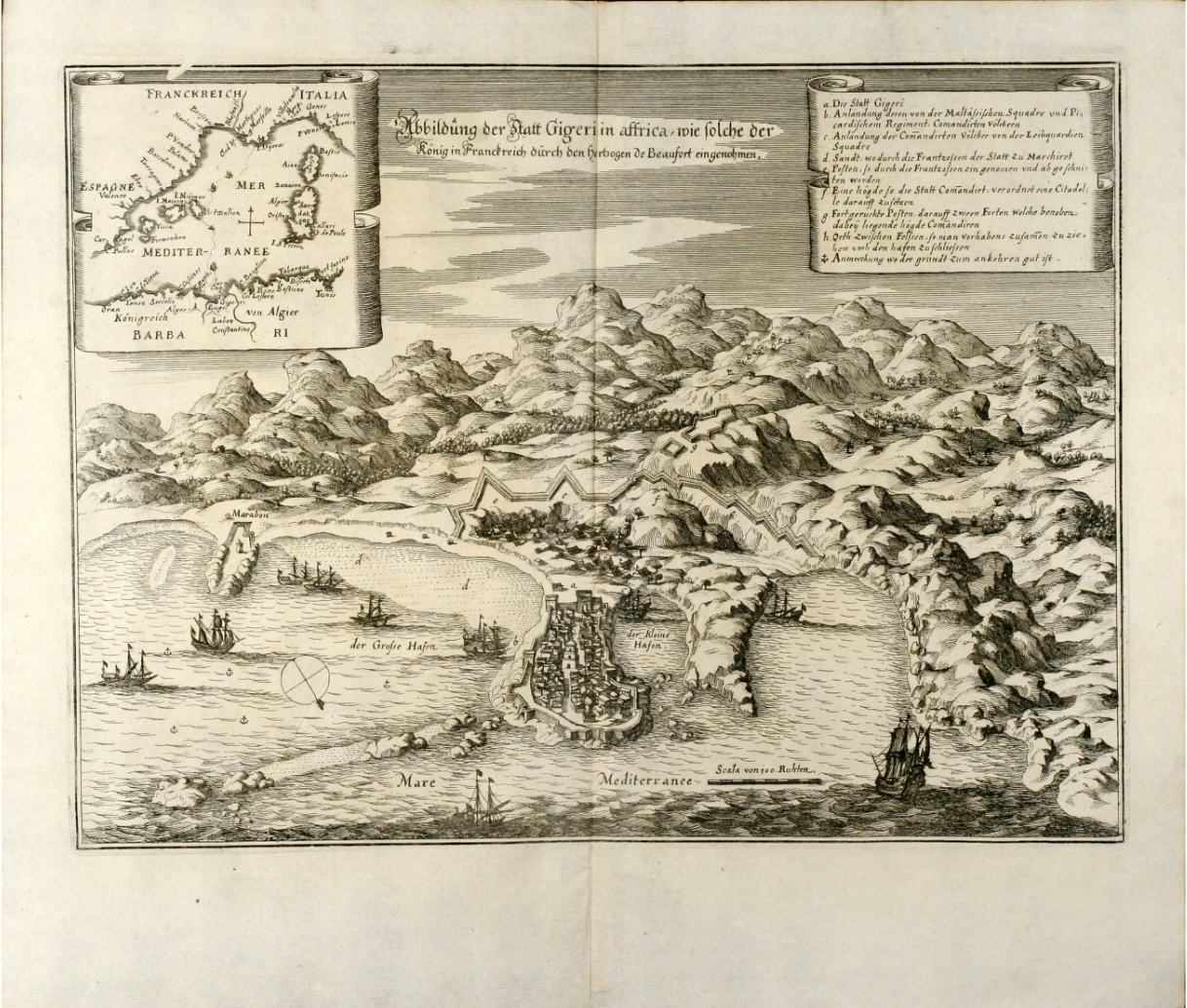 Attractive engraving of the Jijel (Djidjelli) in North-west Algeria from Matthäus Merian. Showing the city with several ships and the Atlas Mountains in background. With an index from a to h and a small inset map of the Western Mediterranean Sea.